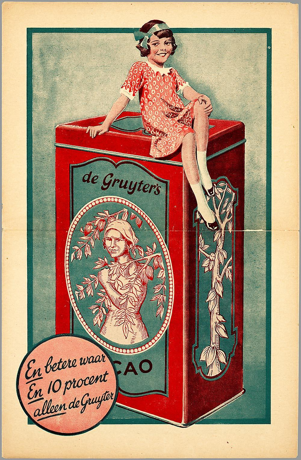 Prijslijst: opdrachtgever/adverteerder: P. de Gruyter & Zn. ('s-Hertogenbosch)